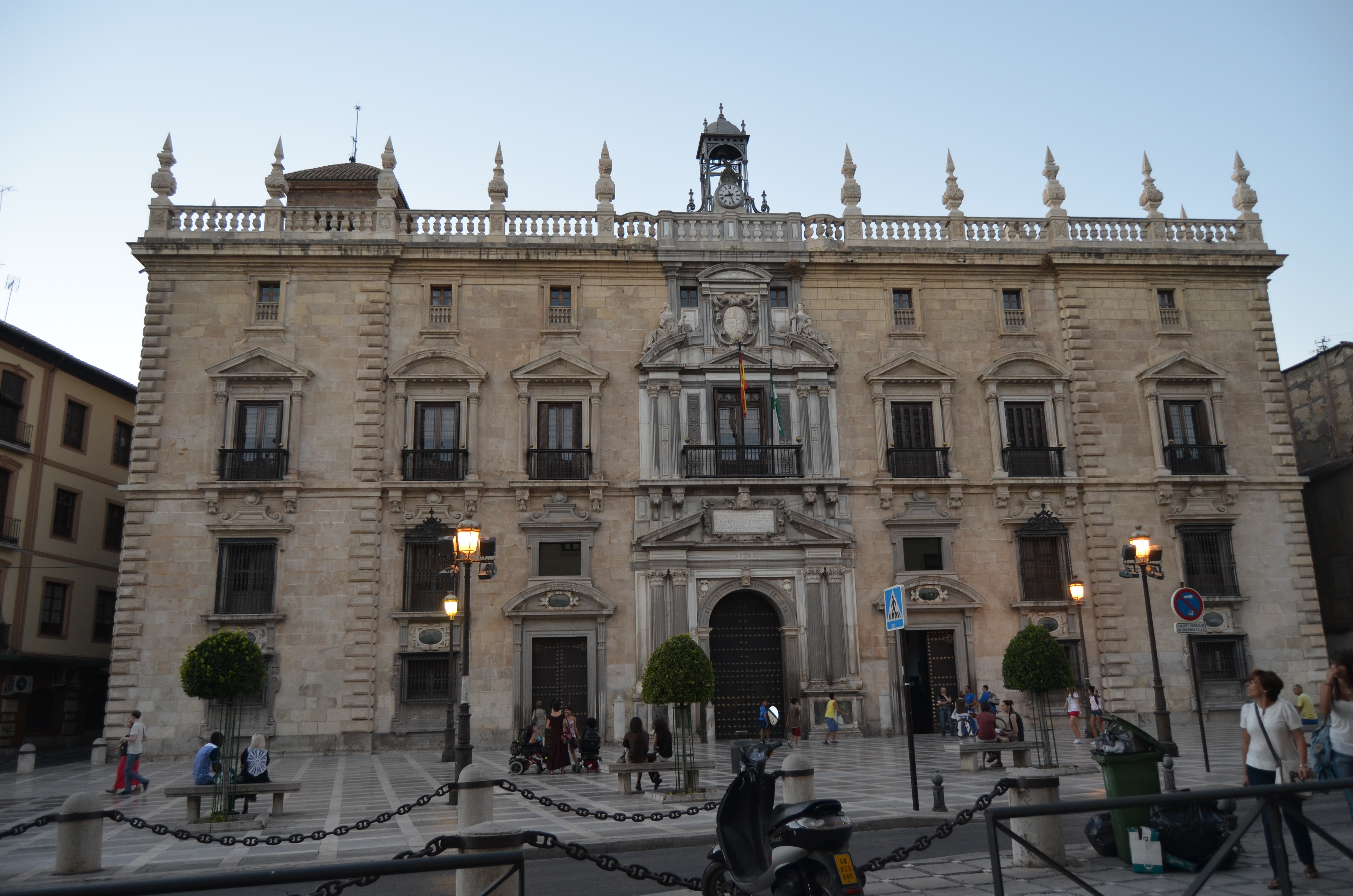 Real Chancillería de Granada (España).Audiencia. RI-51-0004243